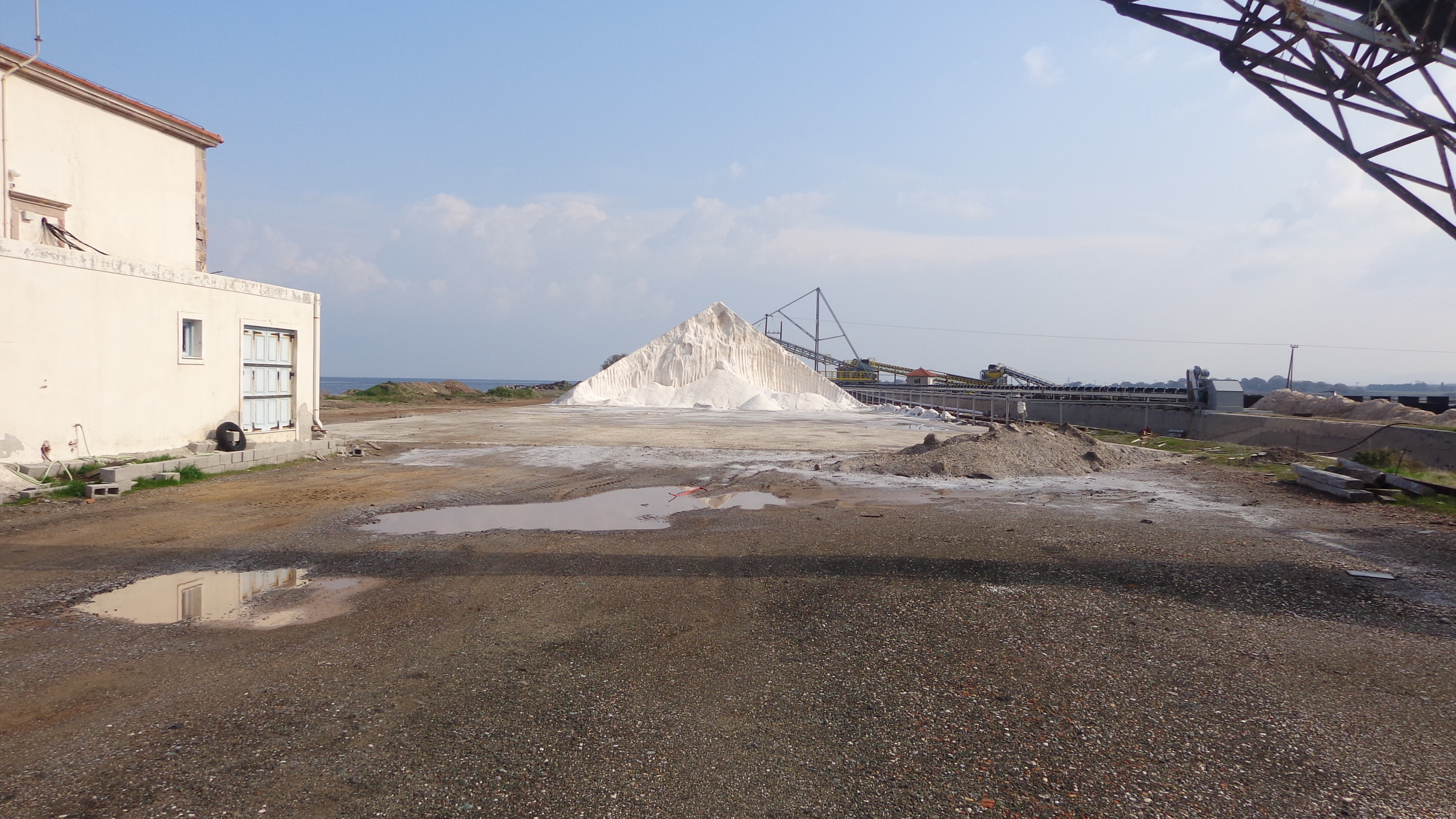 Βουνό Αλατιού